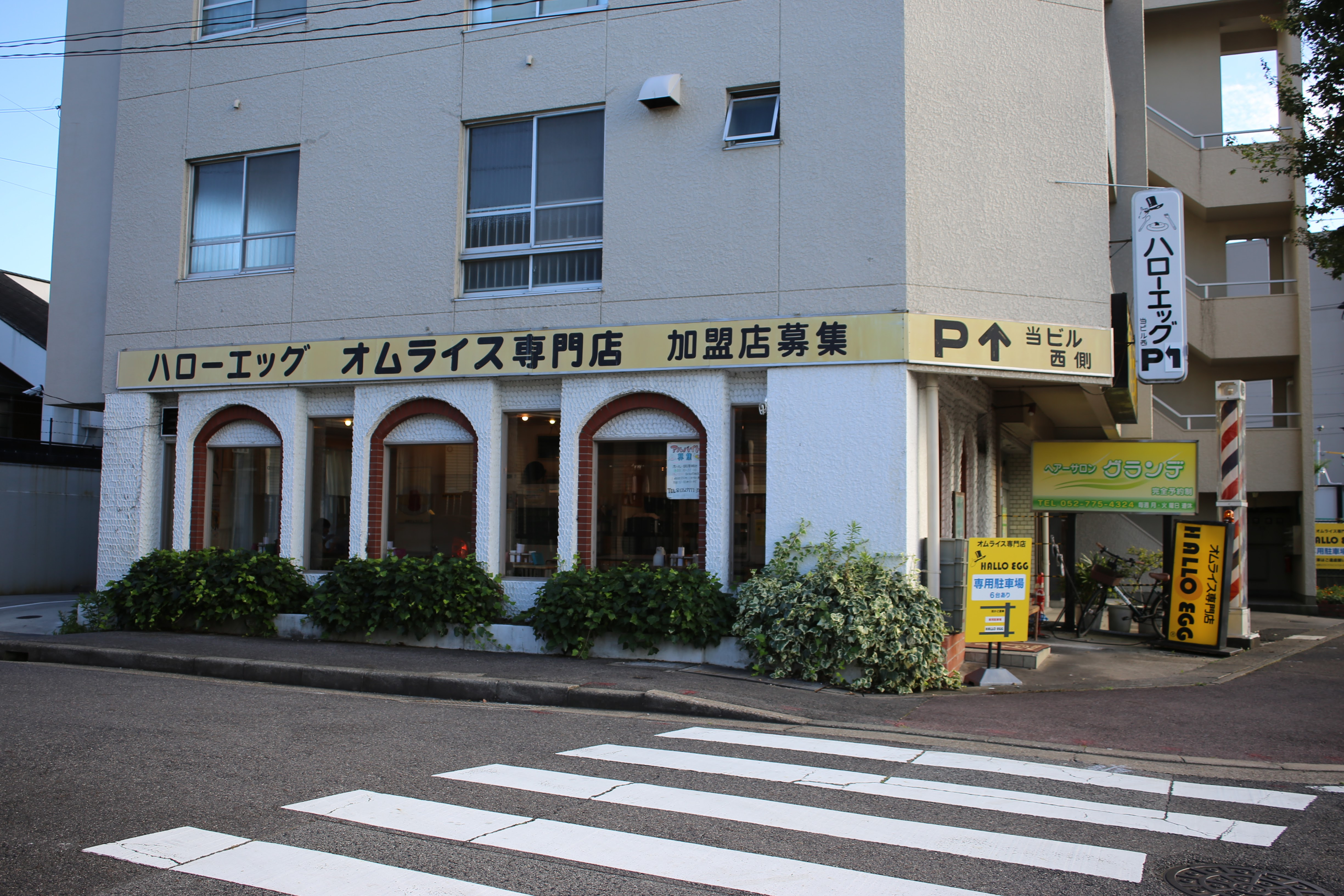 名古屋市名東区平和が丘のハローエッグ平和が丘店